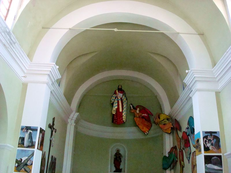 Interno della chiesa parrocchiale di San Vittorio a Santa Teresa Gallura.